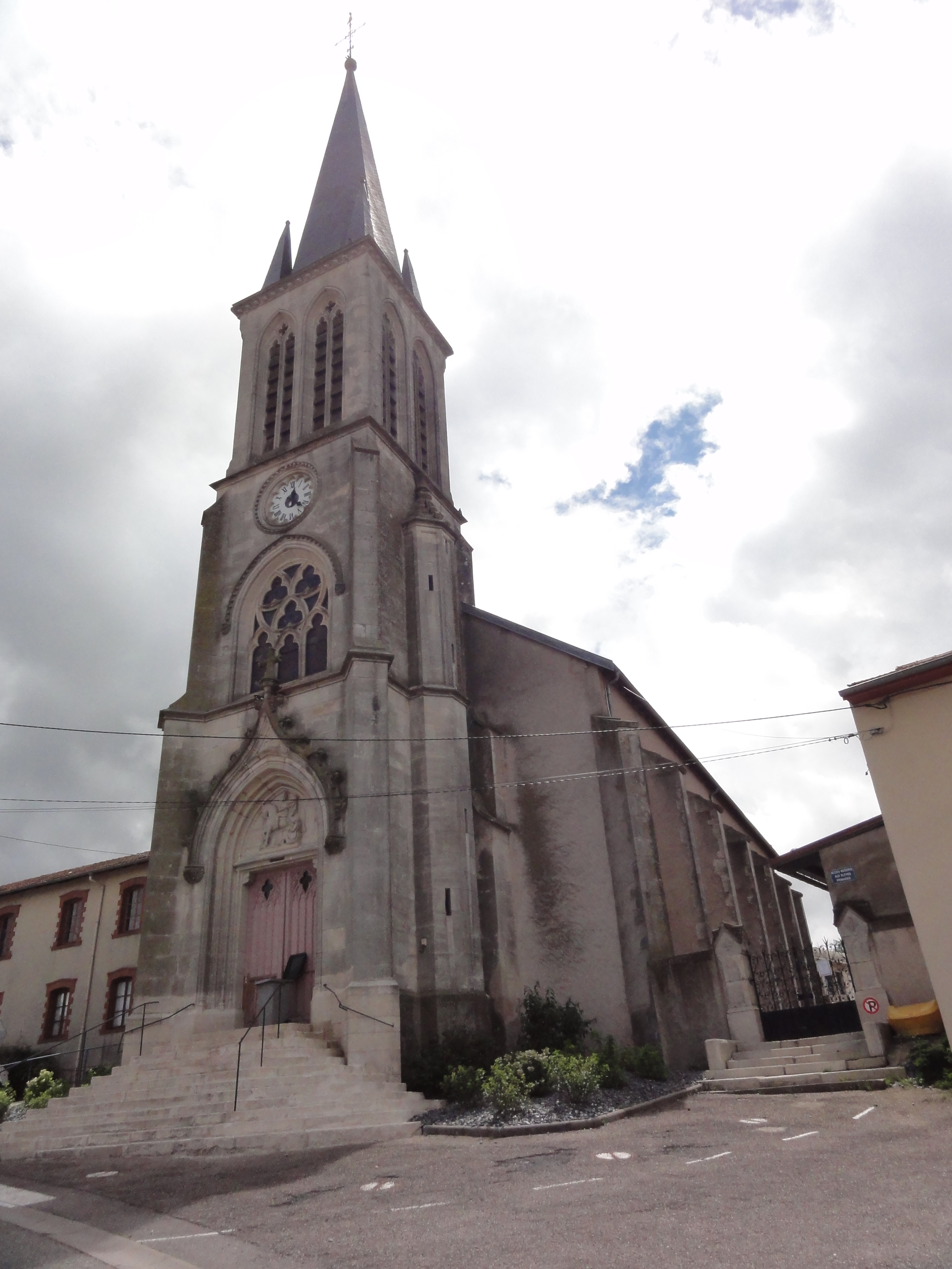 Benney (M-et-M) église